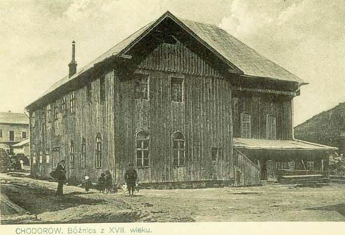 XVII wieczna drewniana synagoga w Chodorowie stan 1913